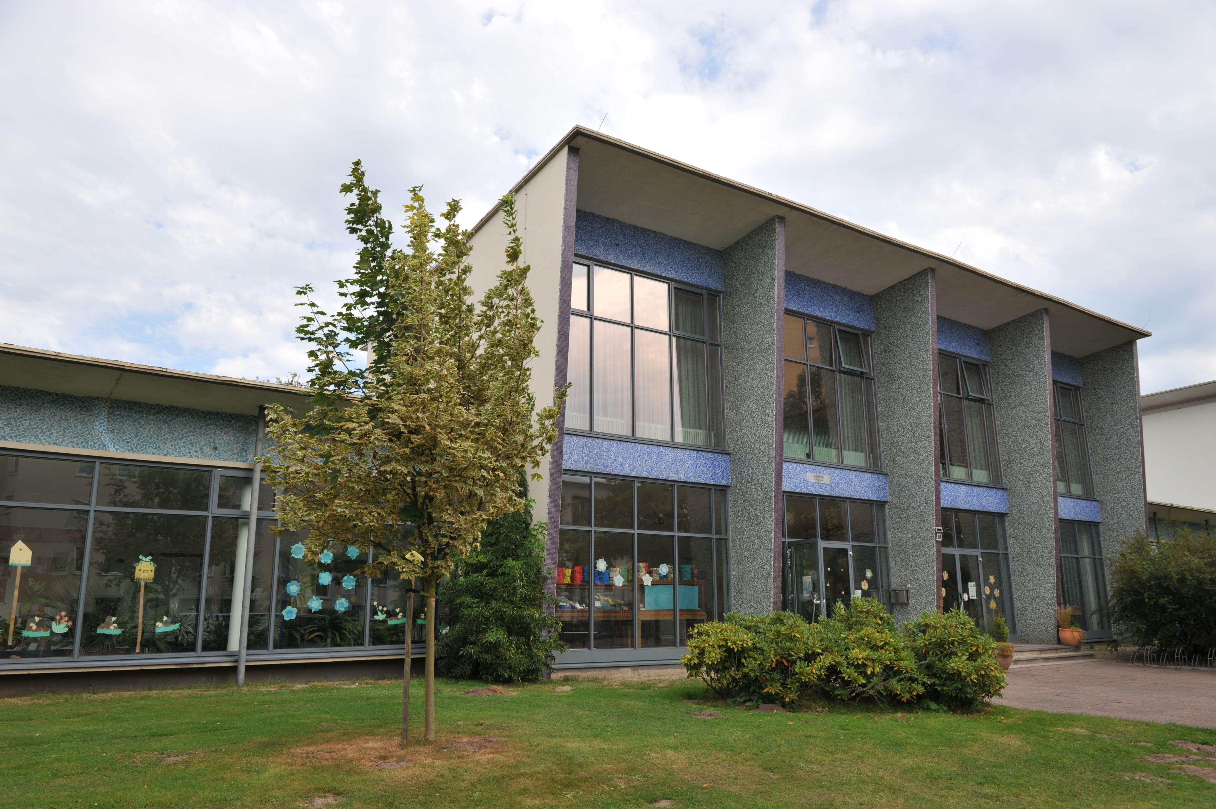 Historical building in Bremerhaven, northern Germany Goetheschule, Deichstraße 37/39, 1955-1956 von Coldewey Das abgebildete Objekt ist ein geschütztes Kulturdenkmal in der Freien Hansestadt Bremen, mit der Nr. 1535 beim Landesamt für Denkmalpflege registriert.